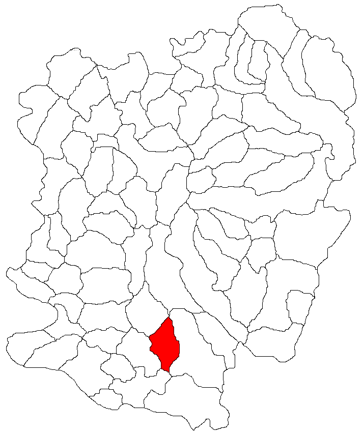 Categorie:Hărţi ale judeţului Caraş-Severin